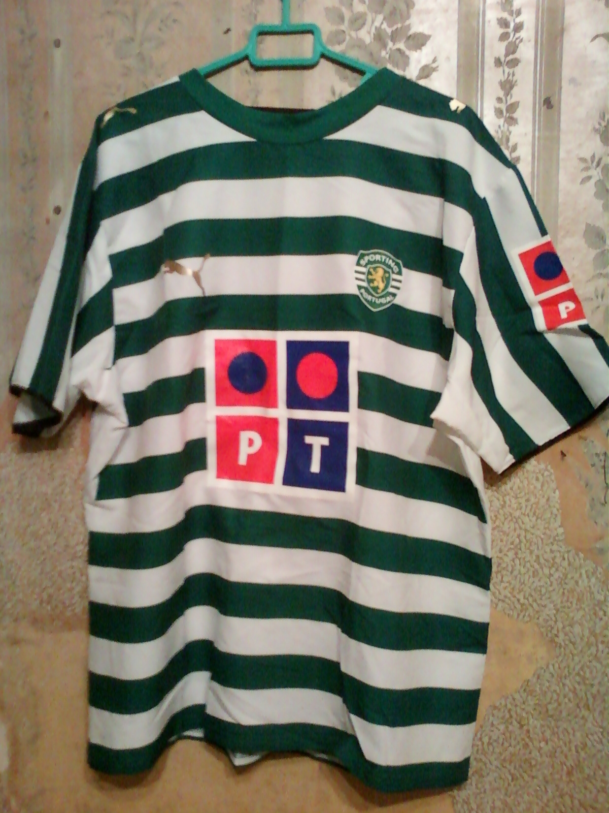 Maillot home du Sporting CP lors de la saison 2006-2007